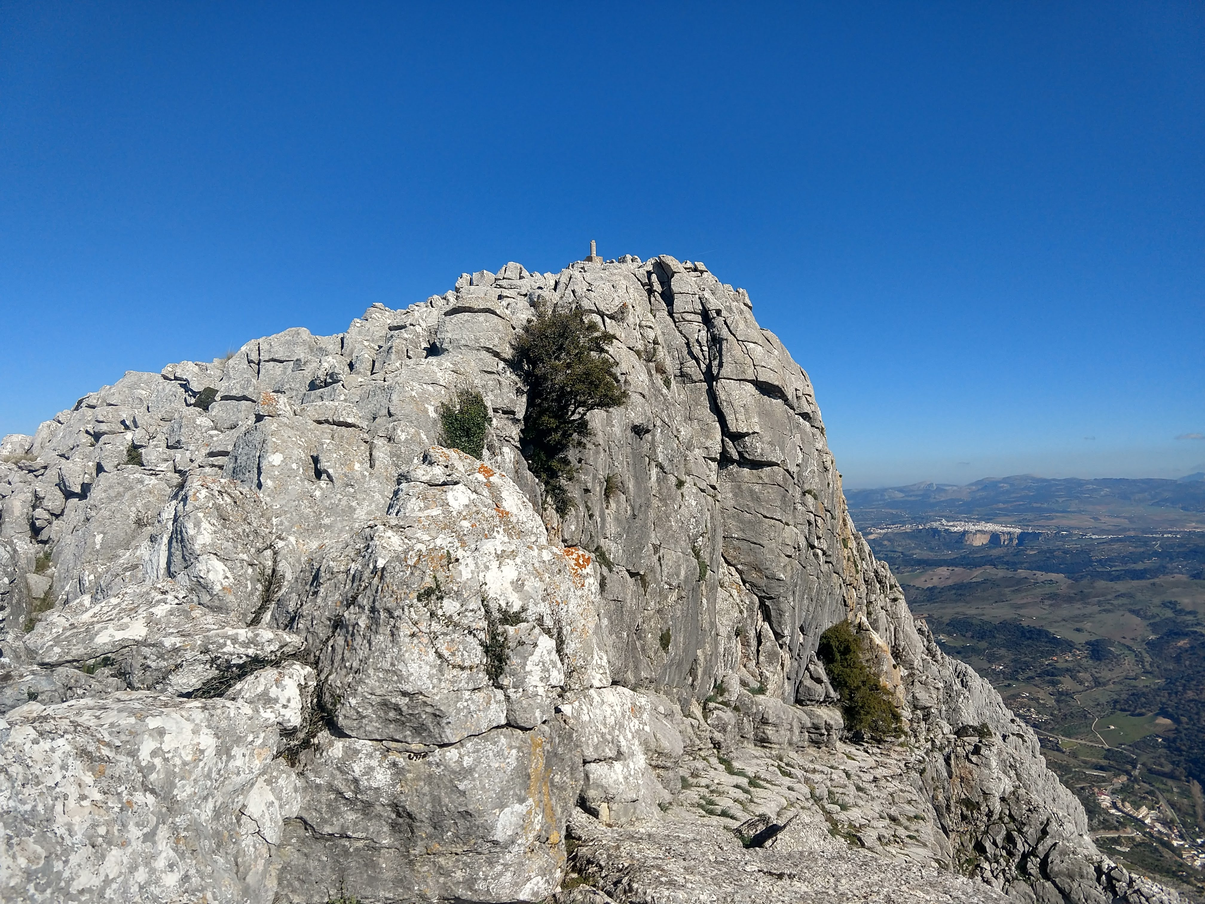 Imagen de la cima del Pico Ventana, en Enero 2020, visto desde una de las ventanas laterales que dan nombre a la montaña.